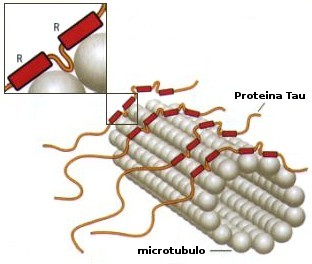 Rôle de Tau dans la cohésion des microtubules